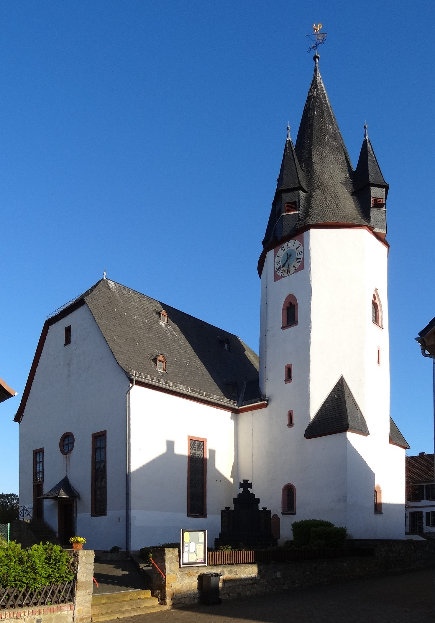 Evangelische Pfarrkirche (Ostheim)